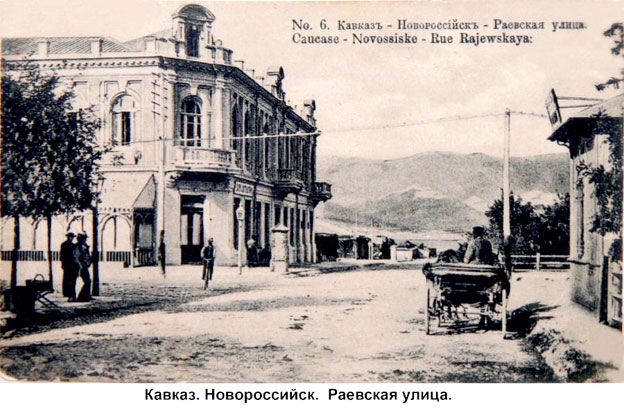 Улица Раевская в Новороссийске в 1900-е годы